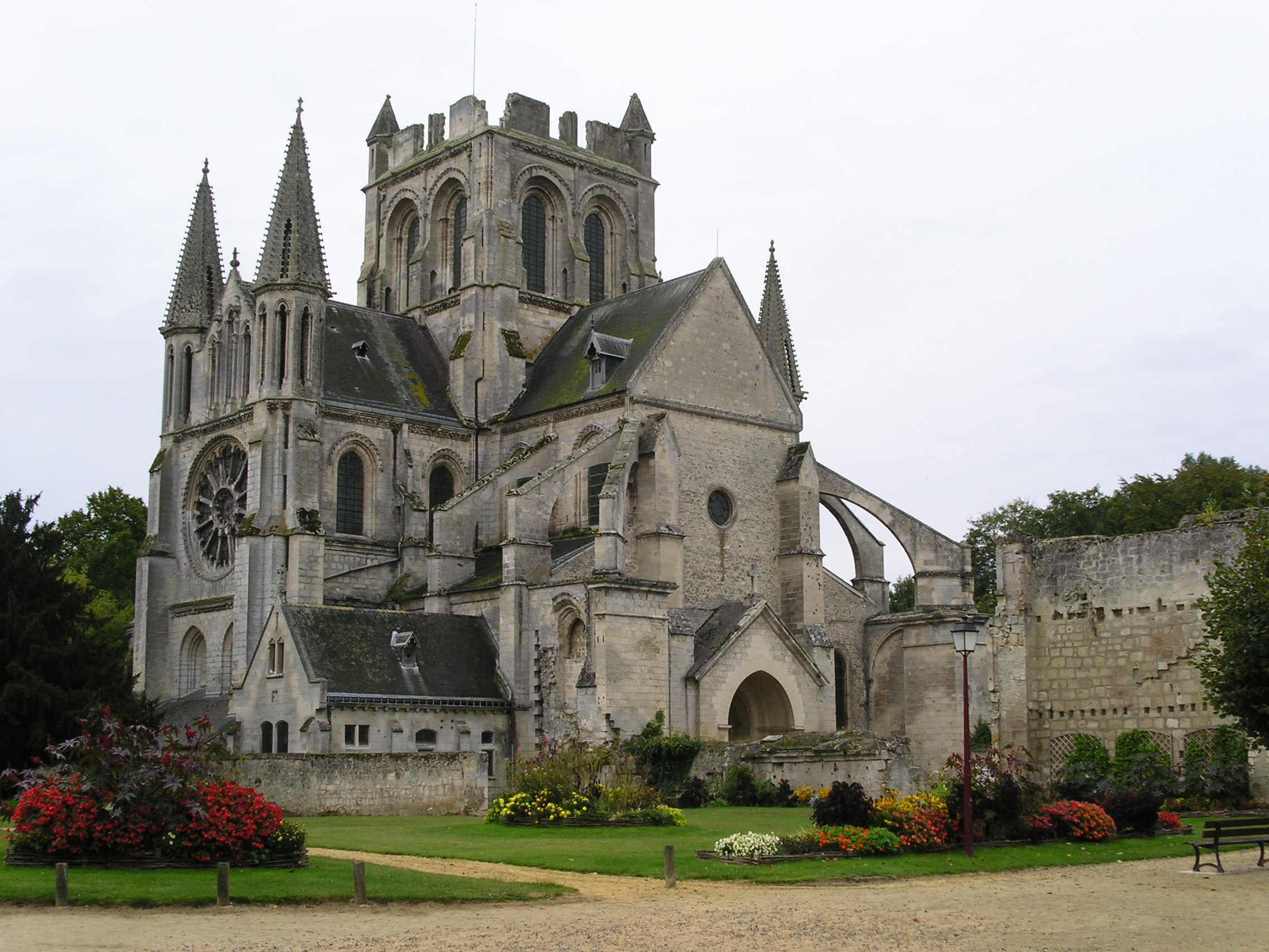 Église abbatiale Saint-Yved de Braine, Aisne - Picardie (N49°20'46,04" E3°31'59,52")